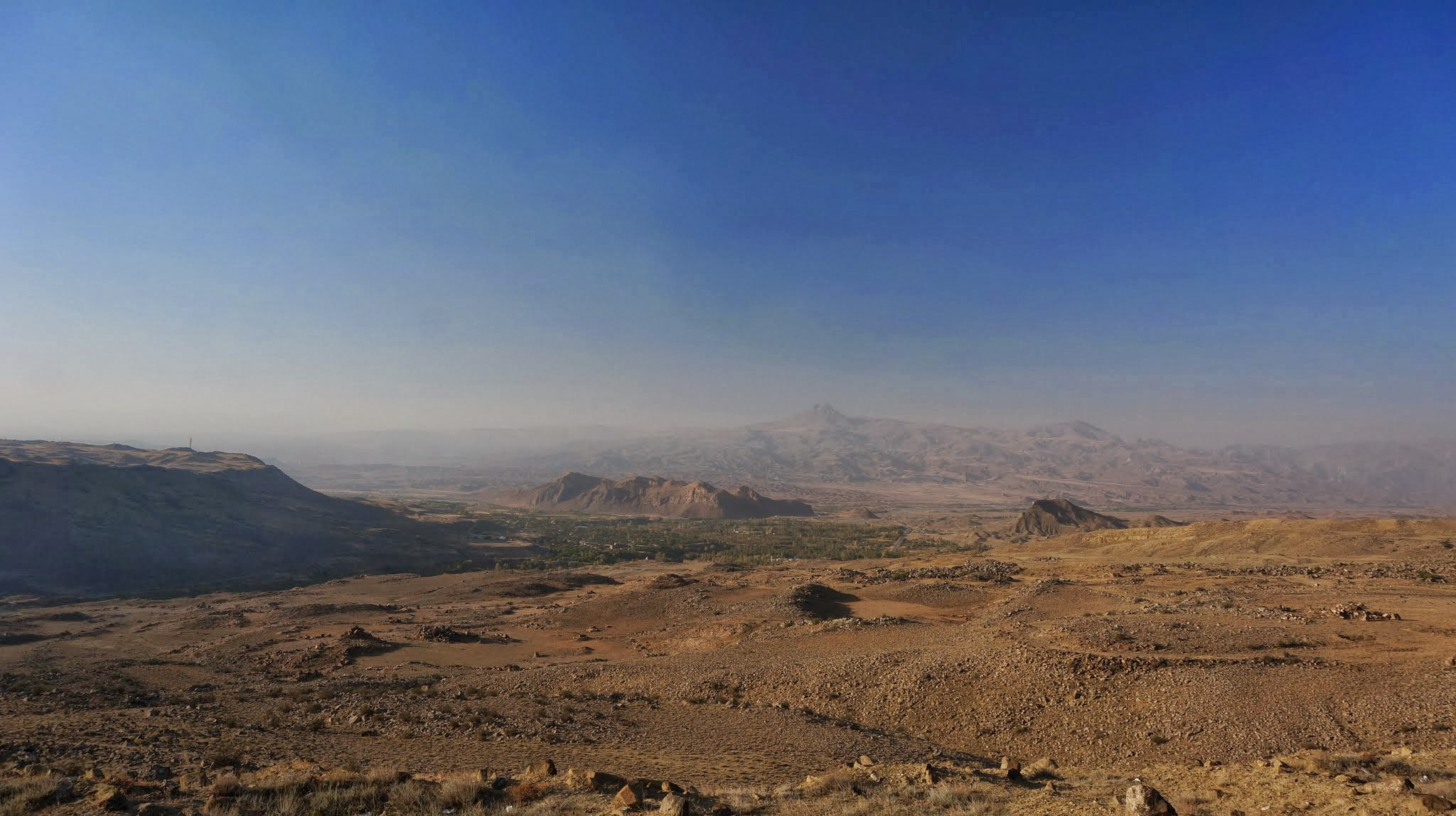 36670 Halıkışlak/Digor/Kars, Turkey